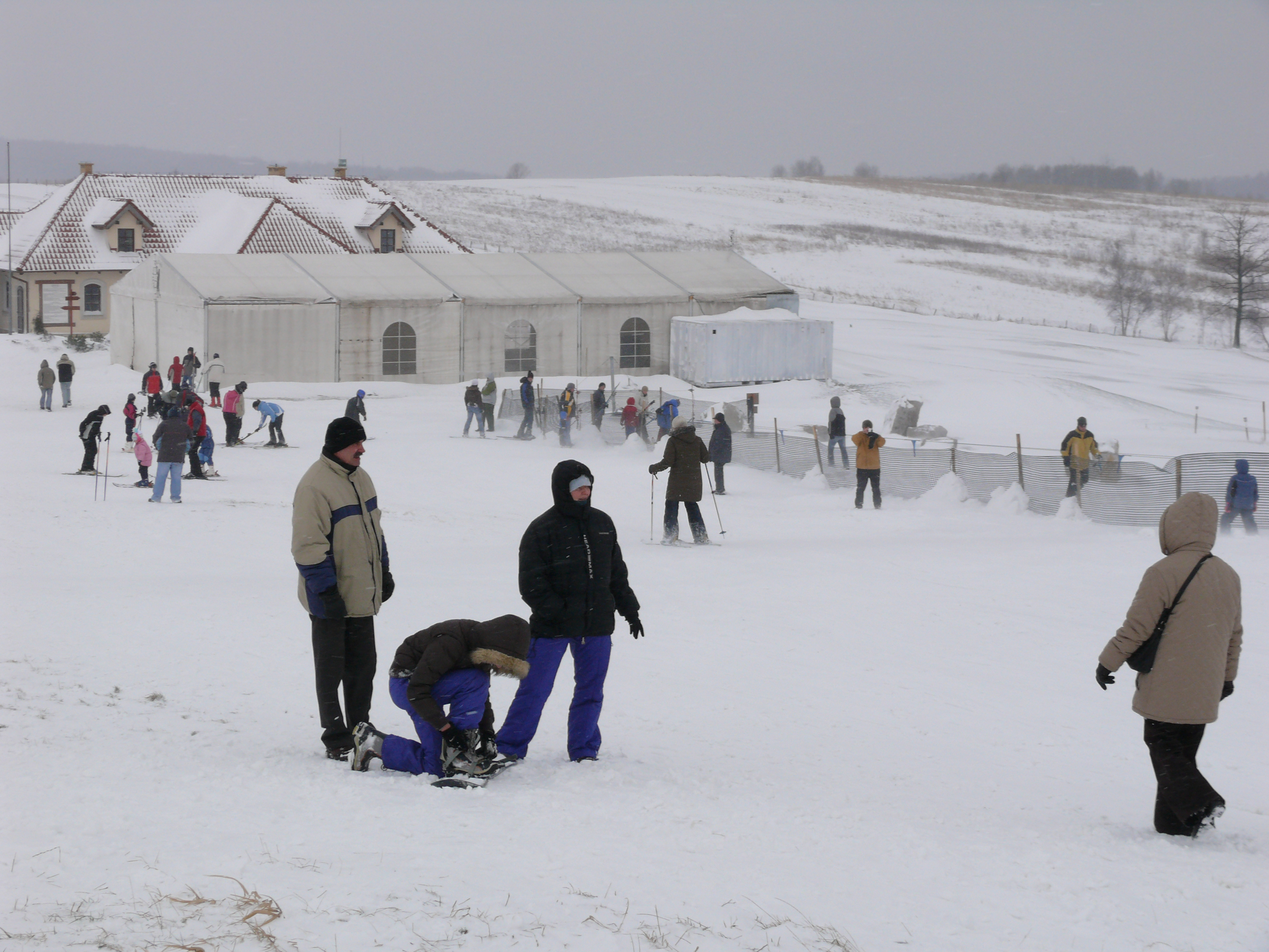 Paczółtowice